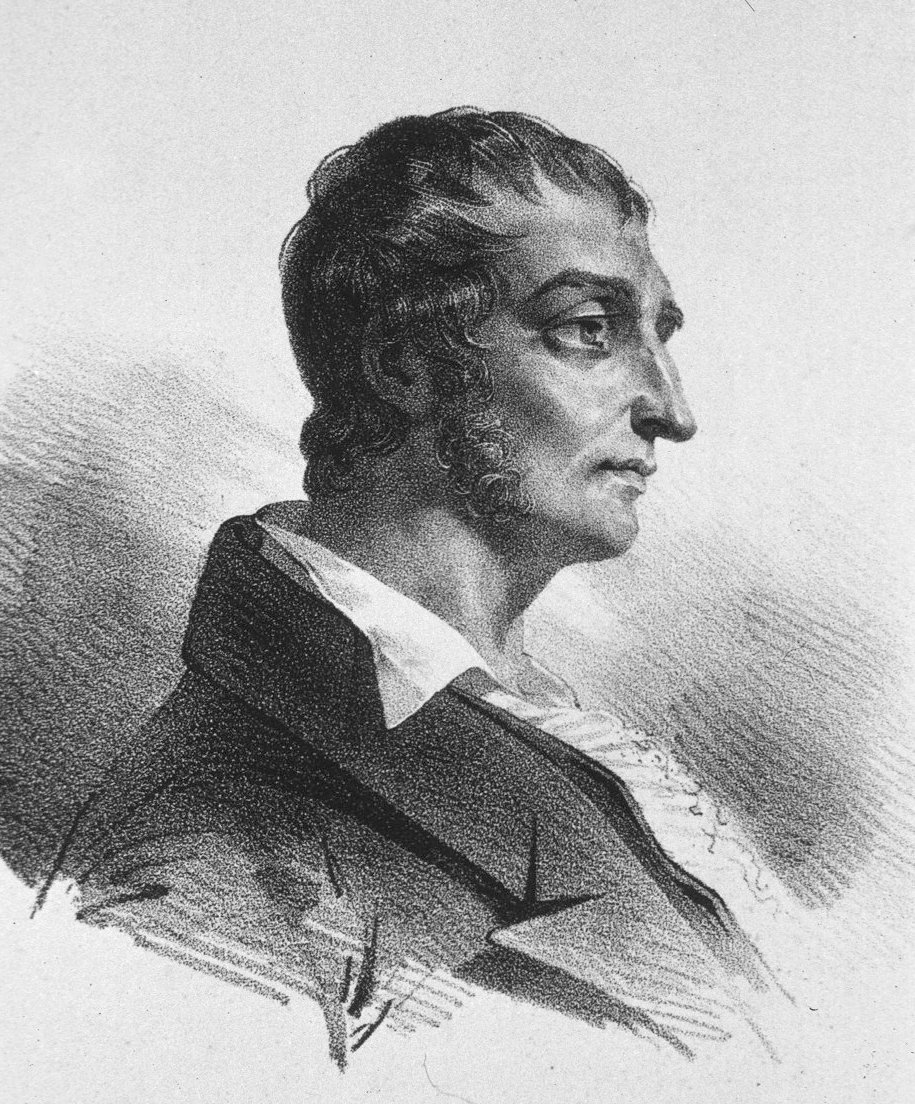 M.F.X. Bichat